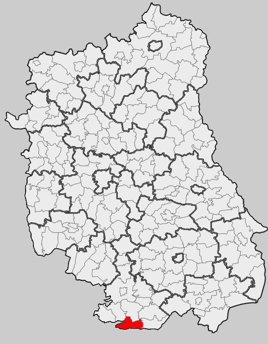 Map of gmina Tarnogród, Biłgoraj county, Lublin voivodship Mapa gminy Tarnogród, powiat biłgorajski, województwo lubelskie